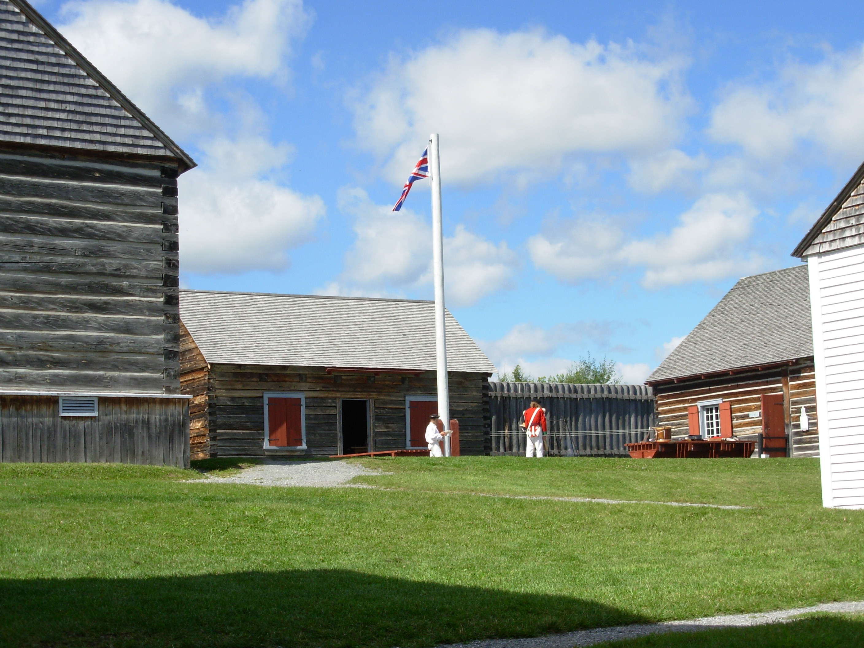 Vue de l'intérieur du Fort Ingall. Dortoirs des soldats, cuisine et dortoir des officiers